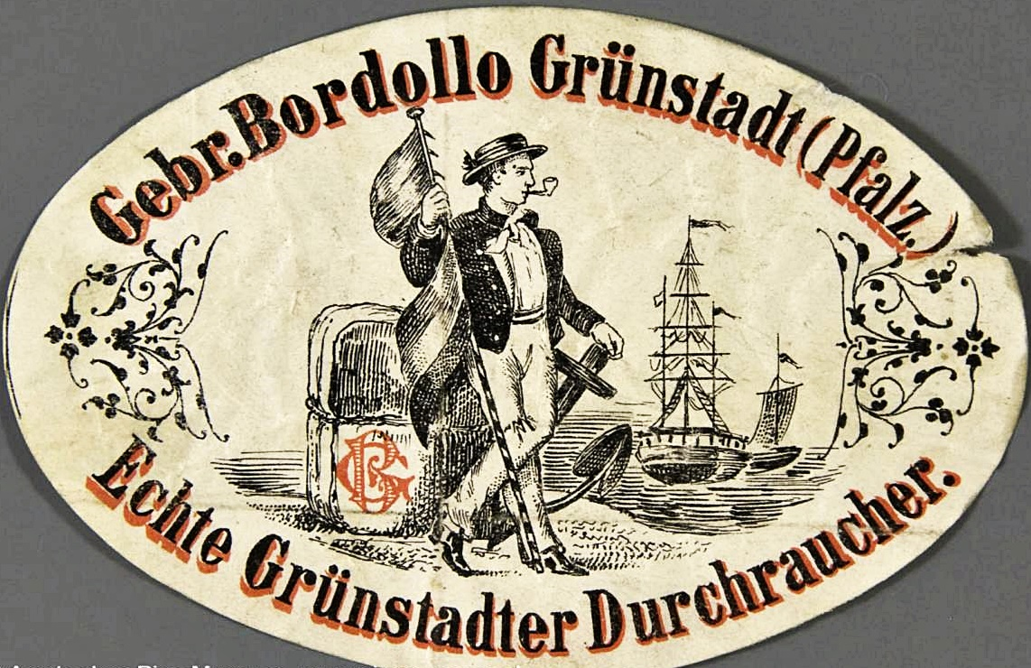 Pfeifenetikett, Gebr. Bordollo Grünstadt, um 1865